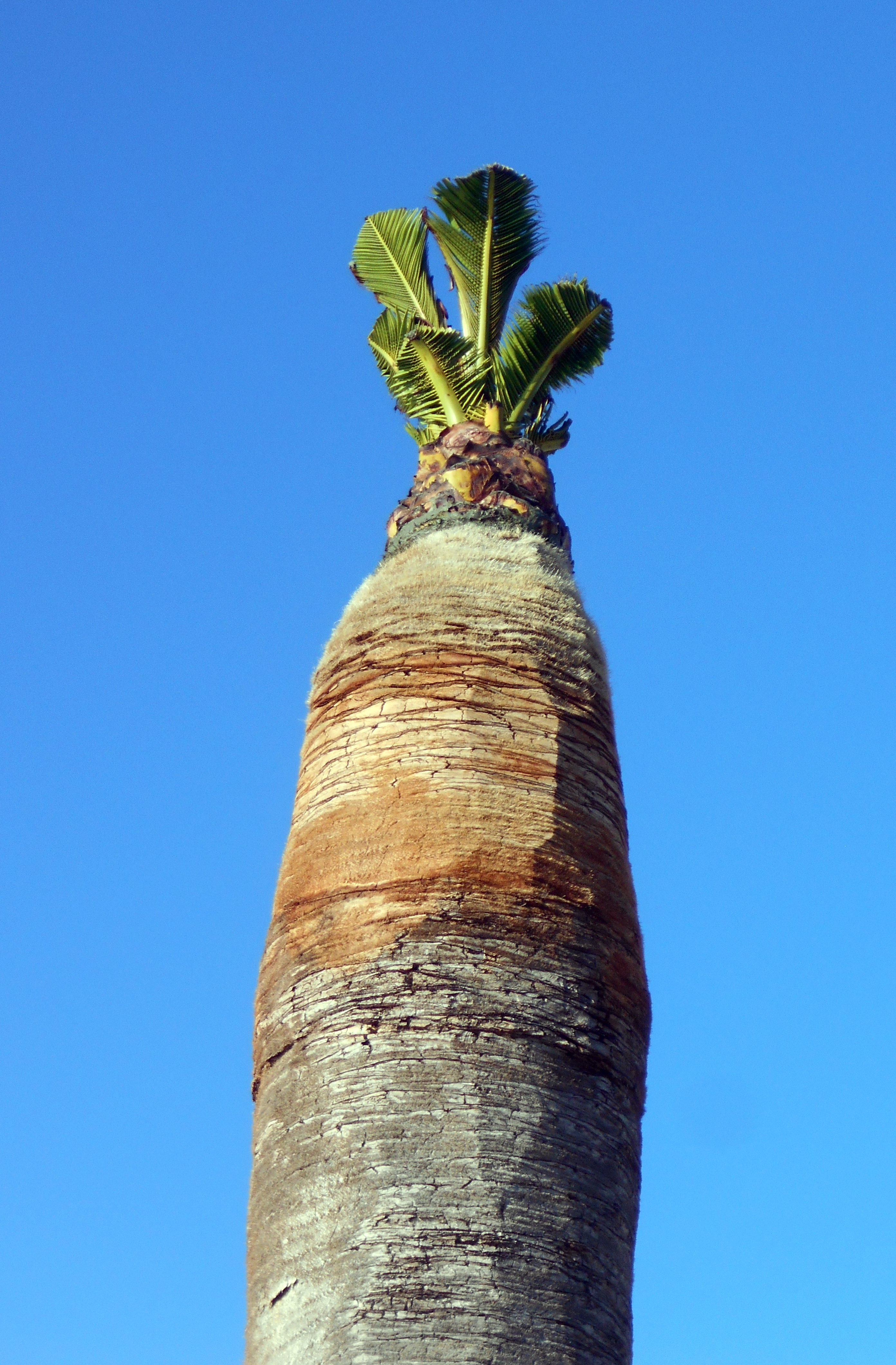 Lečena feniks palma (Phoenix canariensis) koja se oporavlja posle napada crvenog palminog surlaša (Rhynchophorus ferrugineus)